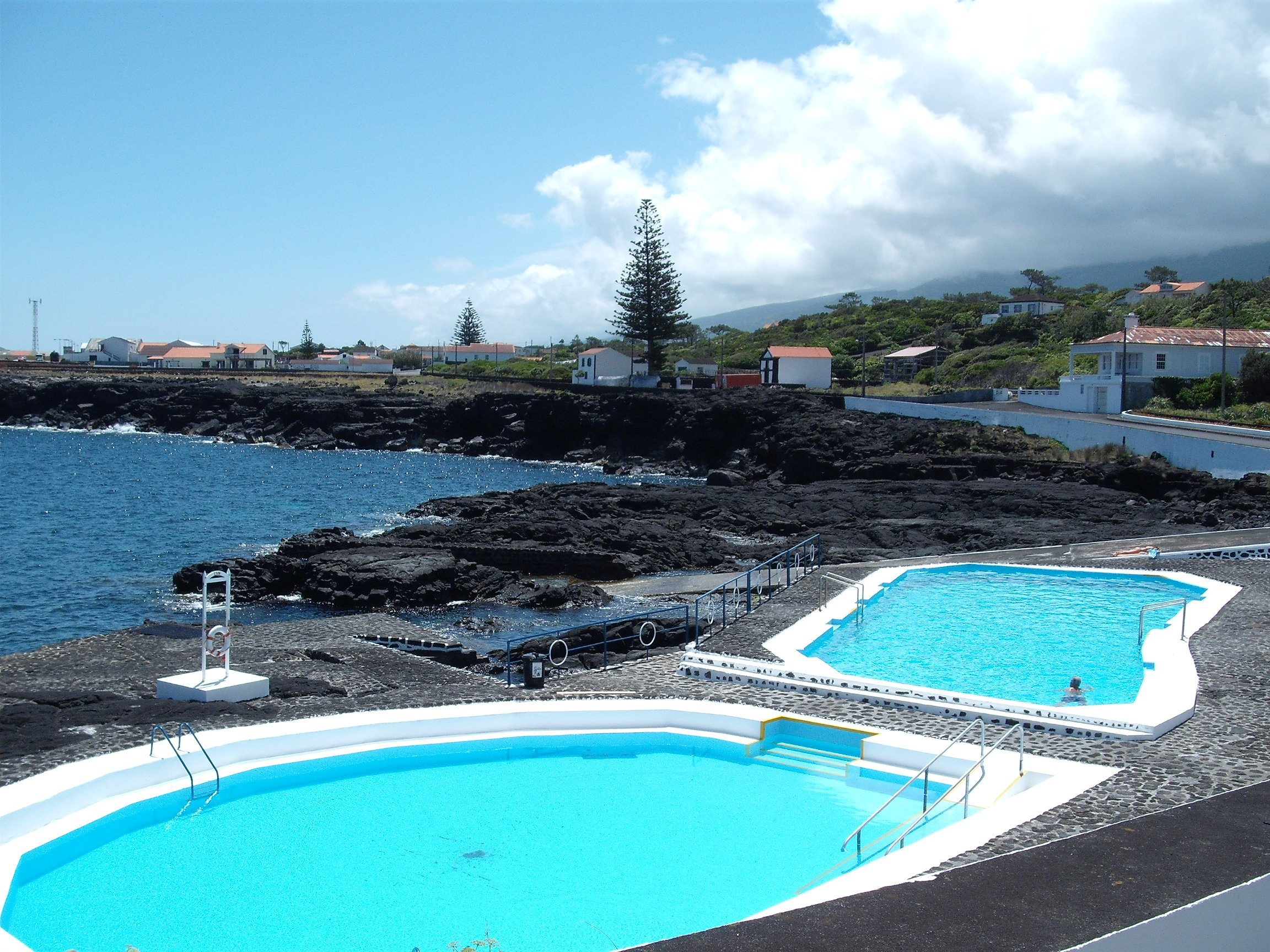 Swimmingpools in Santo António auf Pico, Azoren